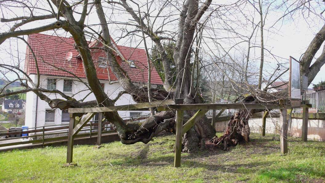 Geleitete Linde in Niedenstein